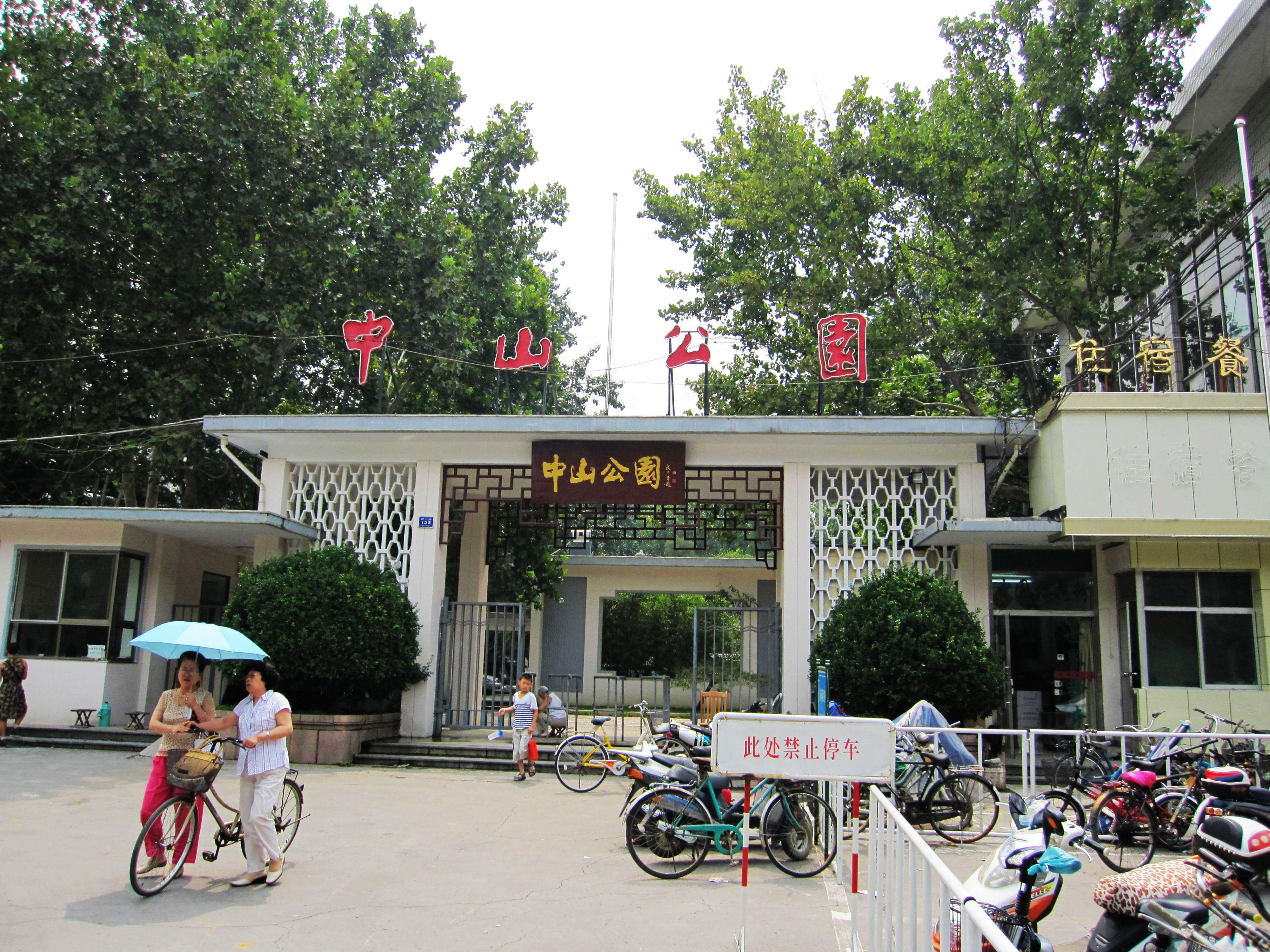 济南中山公园北大门。